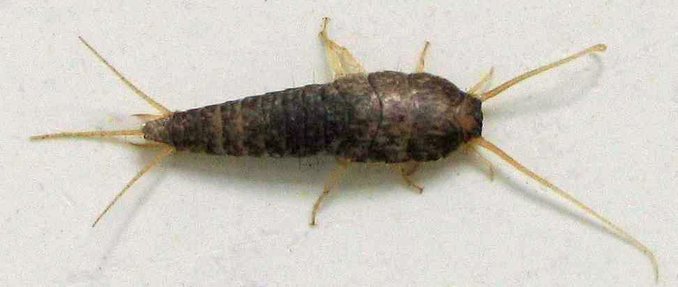 Lepisma saccharina aka silverfish aka Silberfisch